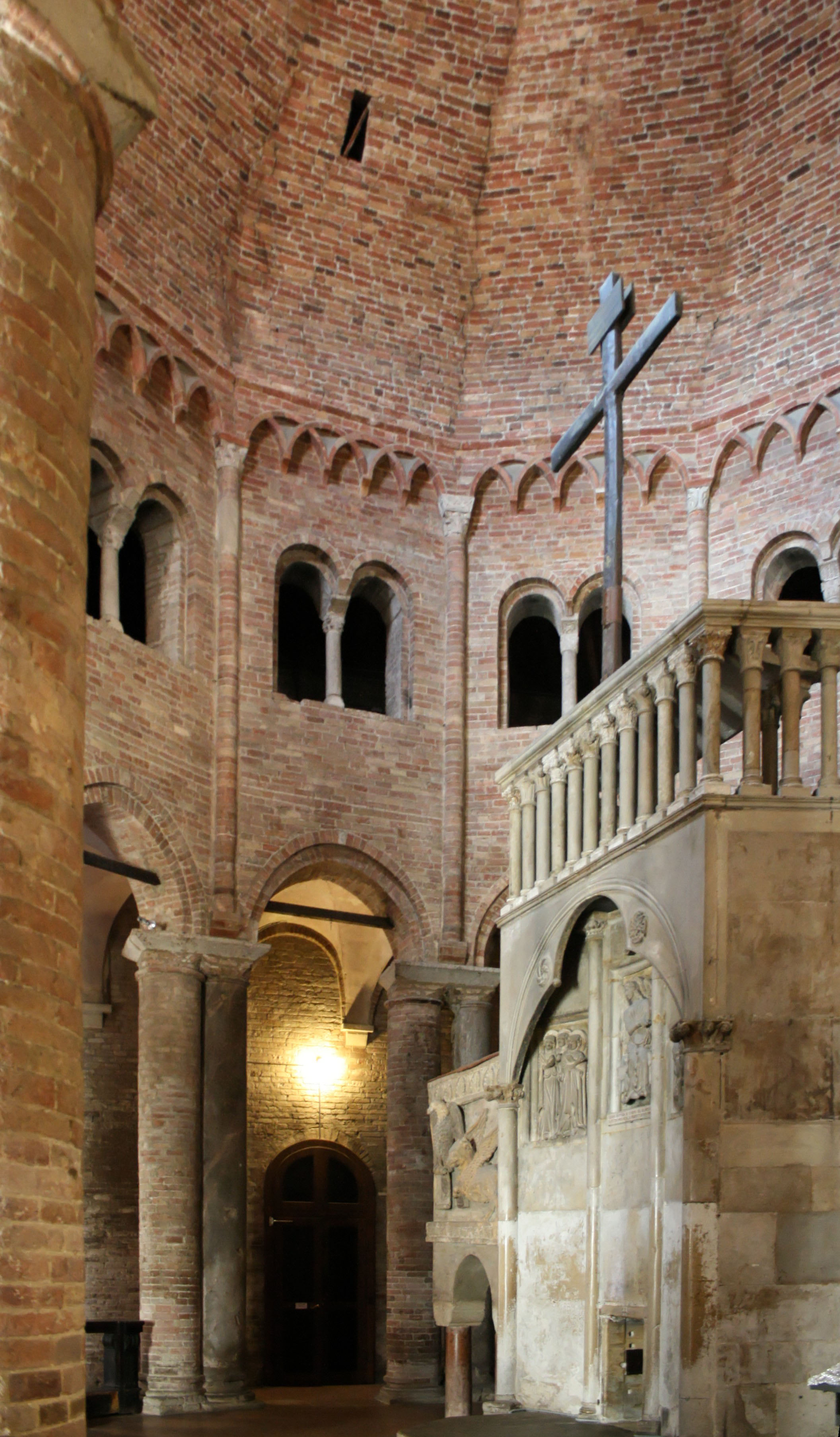 Sancta Jerusalem di Bologna. Quarta Chiesa: S. Sepolcro. Interno con edicola del XIII-XIV° secolo rappresentante il Sepolcro di Cristo e contenente il corpo di S. Petronio